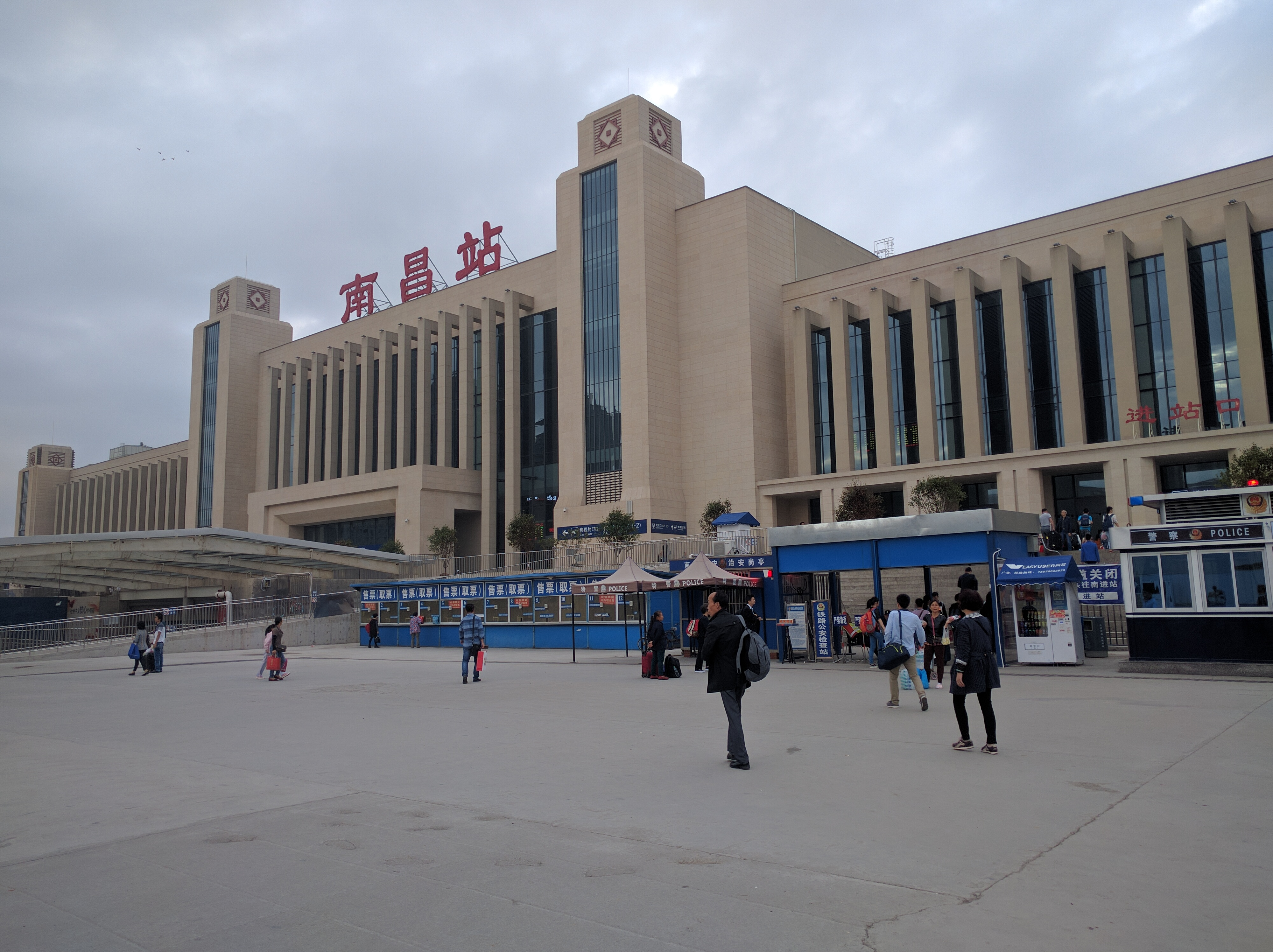 南昌站东侧新建站房